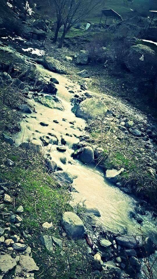 Keçili çayı